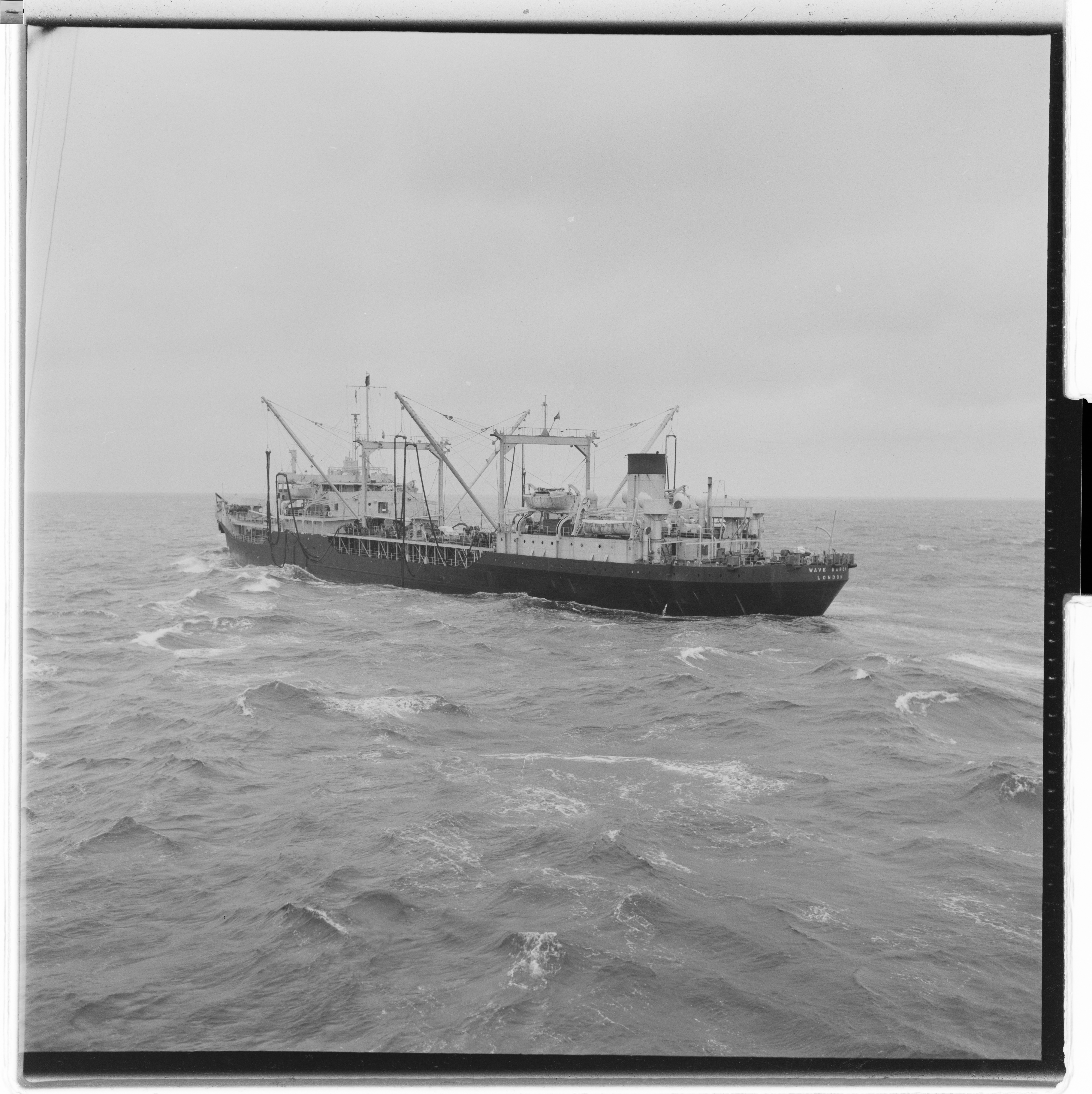 Bildet er hentet fra Arkivverket. Illustrious, hangarskip på Ecercise Mariner. NÅ nr. 22-23, 1953 Arkivinstitusjon : Riksarkivet Arkivnavn : Billedbladet NÅ Sted : Norge, Ukjent, Ukjent, Nordsjøen Emneord: Royal Navy, HMS Illustrious, Hangarskip, Heads up, Mariner, Militære, Militærøvelse Avbildet